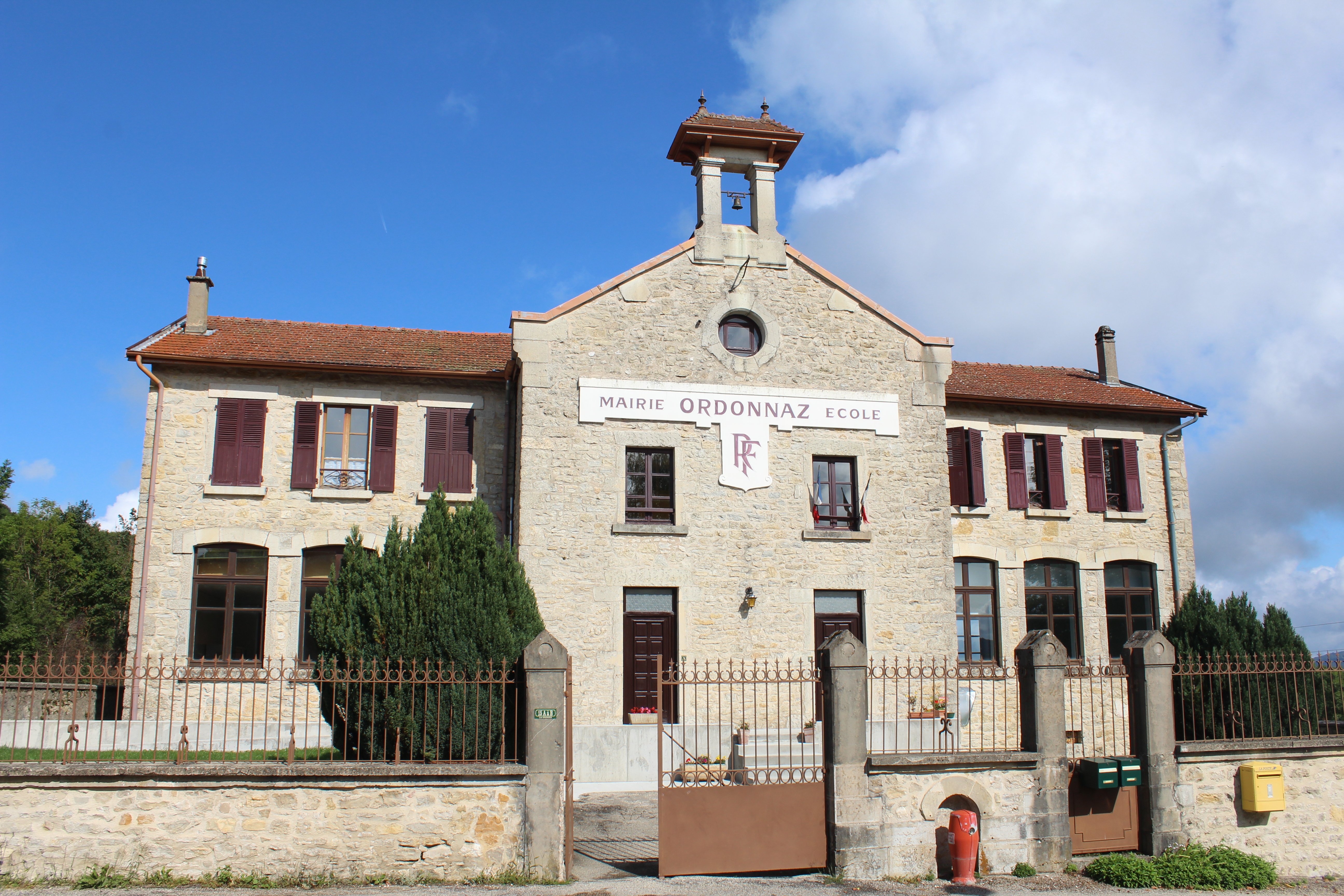 Mairie d'Ordonnaz.